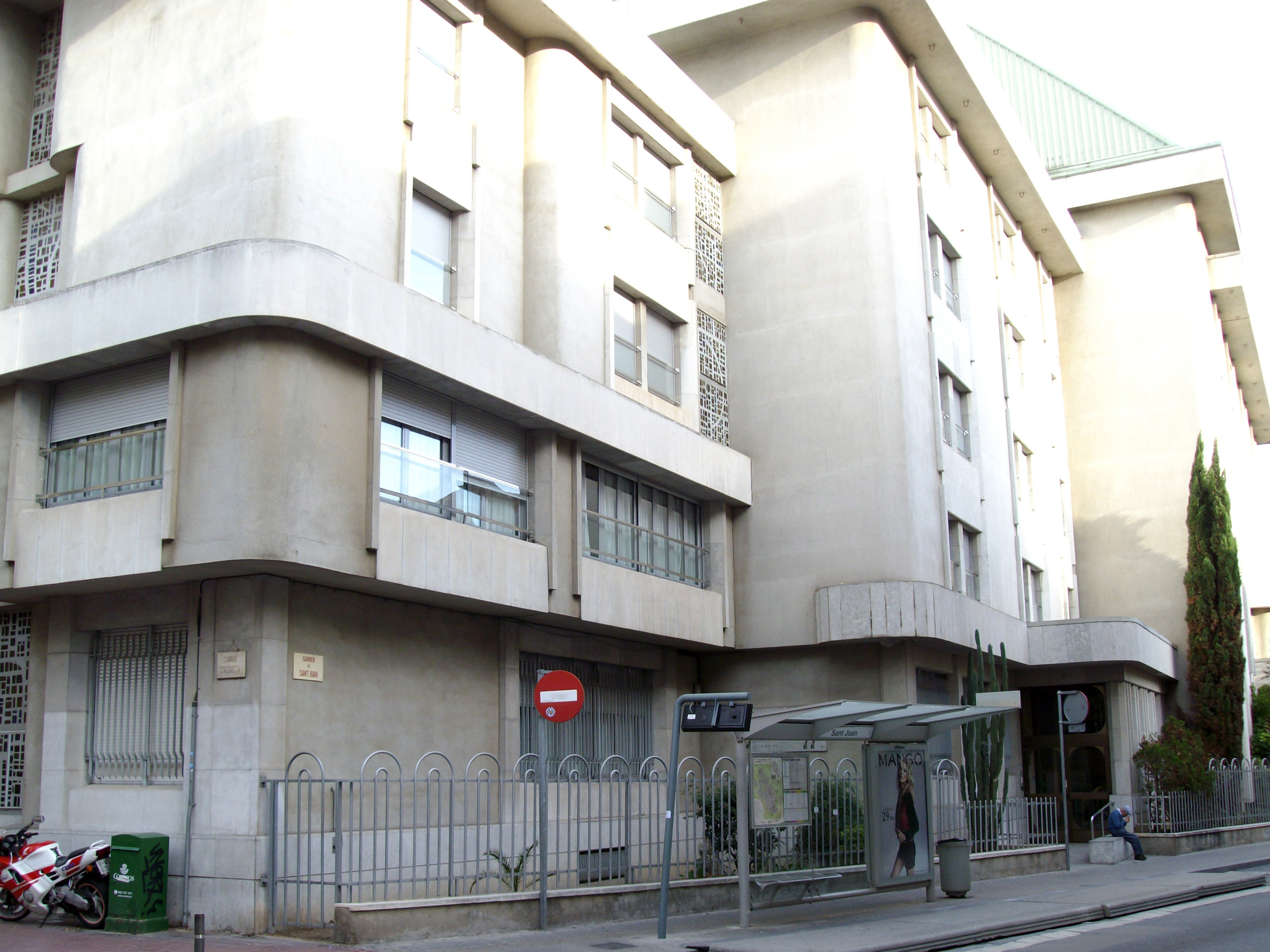 Aspecto actual de la casa pairal del Dr. Félix Sardá y Salvany, sacerdote, apologista y escritor sabadellense, representante destacado del integrismo católico de la Restauración. En 1905 convirtió dicha casa familiar en un asilo de ancianos de las Hermanitas de los Ancianos Desamparados. La casa fue construida a mediados del siglo XIX, siendo reformada en los años 20 por Josep Renom i Costa, posteriormente, en 1985, fue totalmente transformada y ampliada. En la actualidad es la residencia de ancianos "Sardà i Salvany". Está situada en la calle Sant Joan, 9, de Sabadell, Barcelona (España).